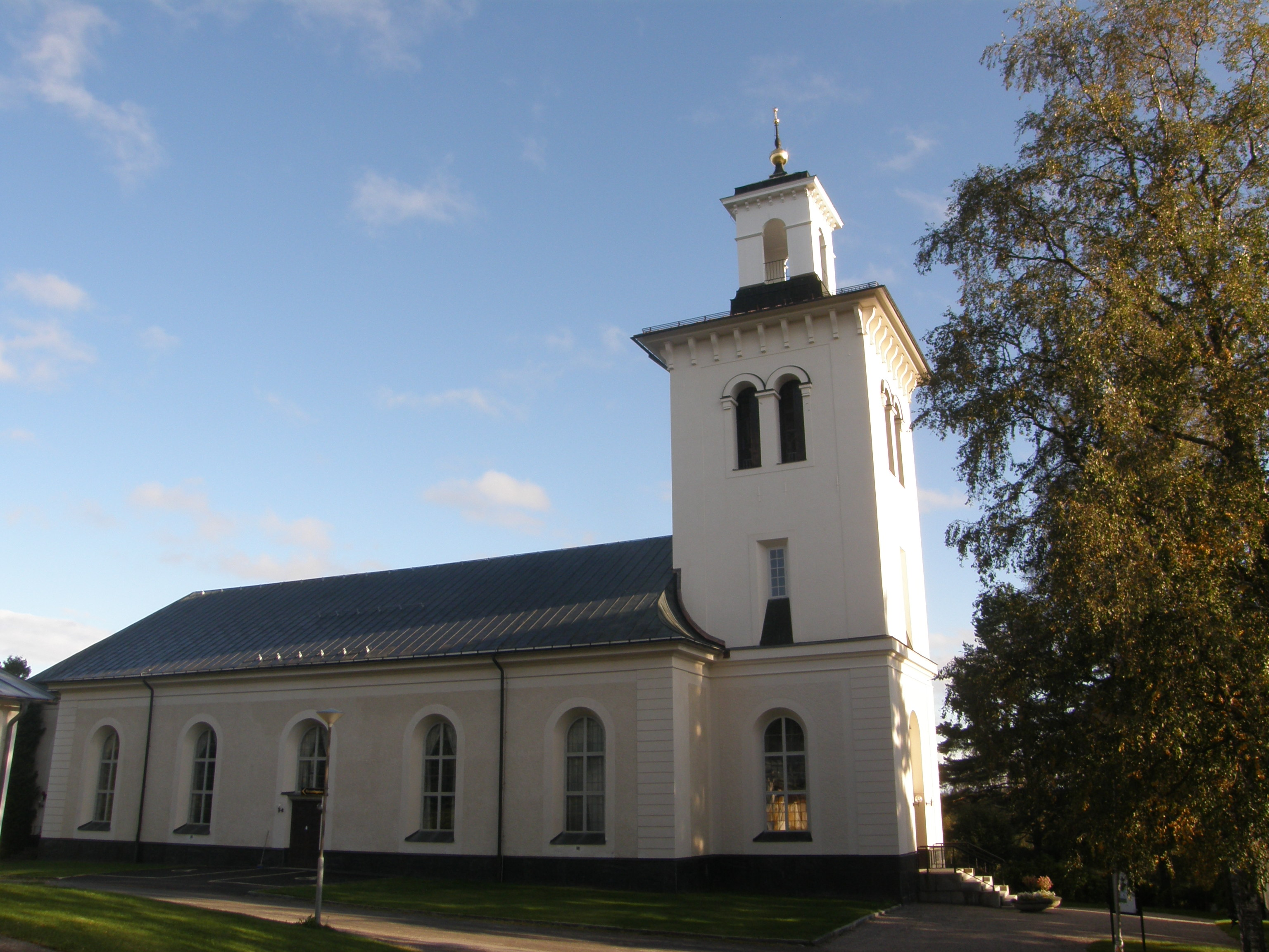 Hässjö kyrka